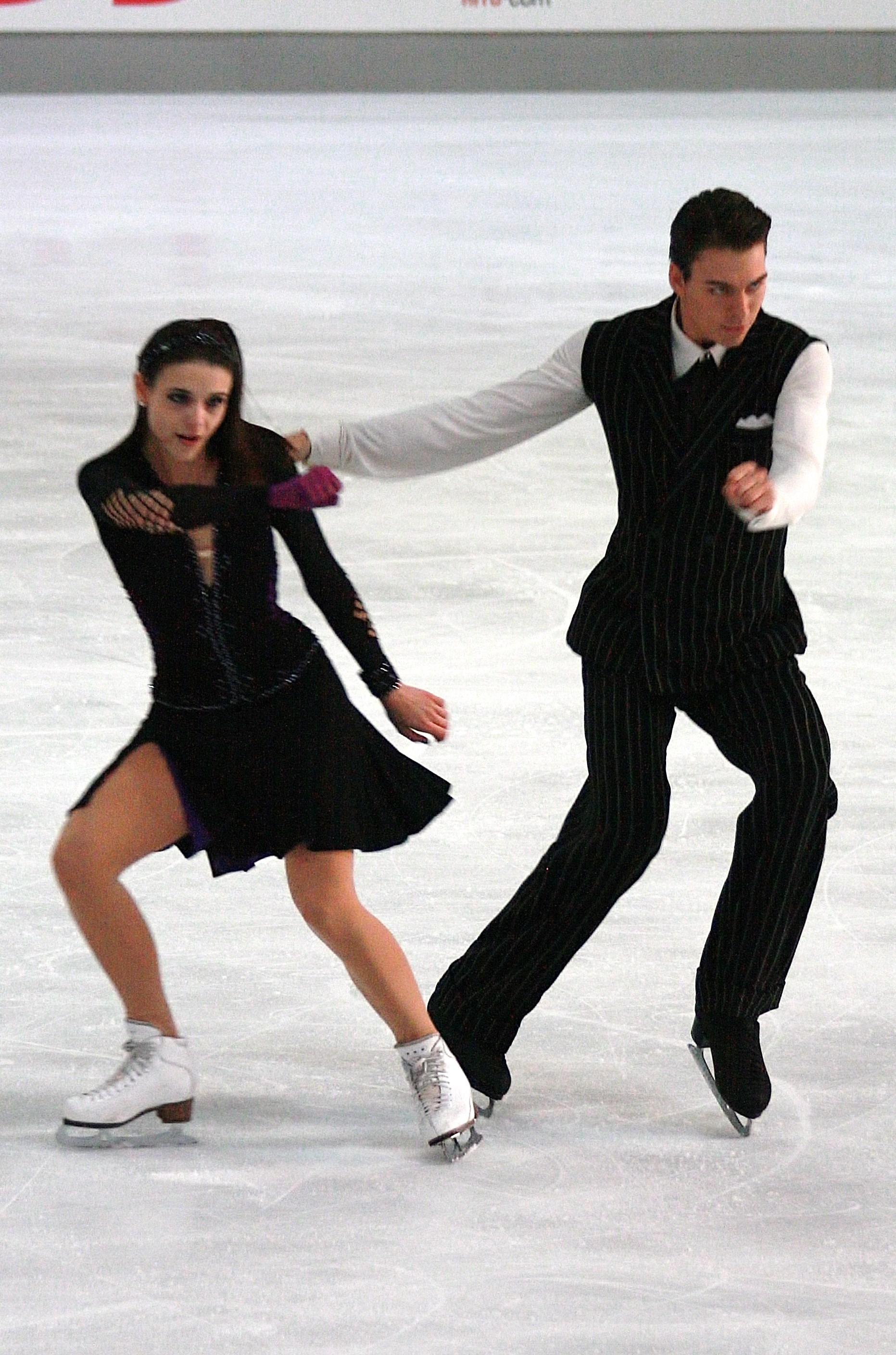 Федерика Теста и Лукаш Цсолей (Словакия) на 2013 Nebelhorn Trophy